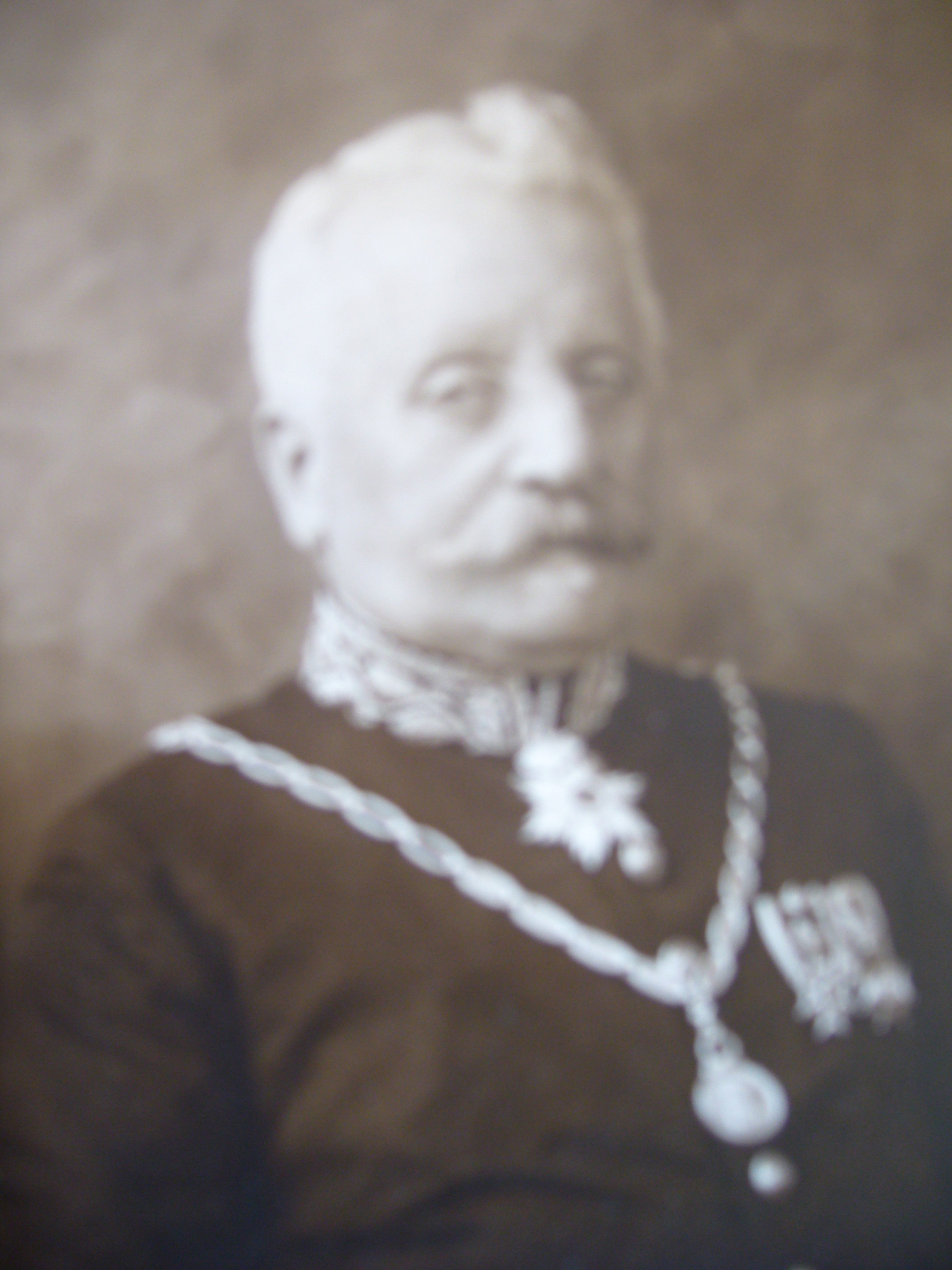 Ferdinand Folef d'Aulnis de Bourouill, burgemeester Baarn van 1897-1916